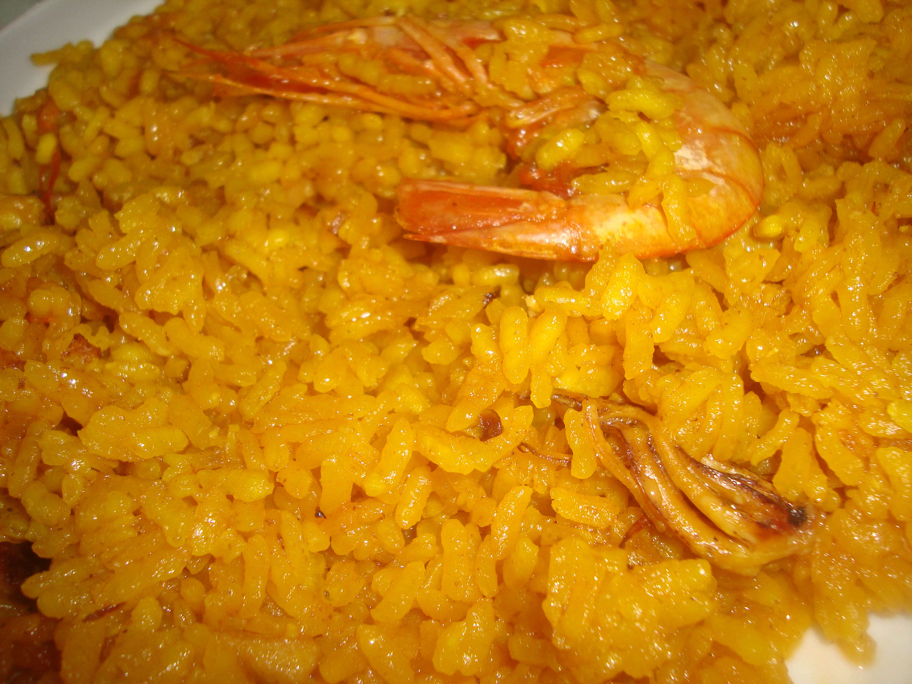 El arroz a banda es un plato típico de los pescadores mediterráneos valencianos, proviene de un origen y economía muy humildes, en la actualidad del siglo XXI se a convertido en uno de los platos de arroz más populares de la restauración de la costa valenciana. El nombre del plato hace referencia a que el arroz se cocina separado del pescado “a banda”, y según la costumbre original de las tripulaciones pesqueras permitía obtener dos platos de la misma elaboración, un primer plato con el pescado y las patatas sin caldo que se consumia con ajoaceite, y un segundo plato que consistia en un arroz seco hecho con un pequeño sofrito y el caldo de la cocción y cocinado en la típica paella valenciana